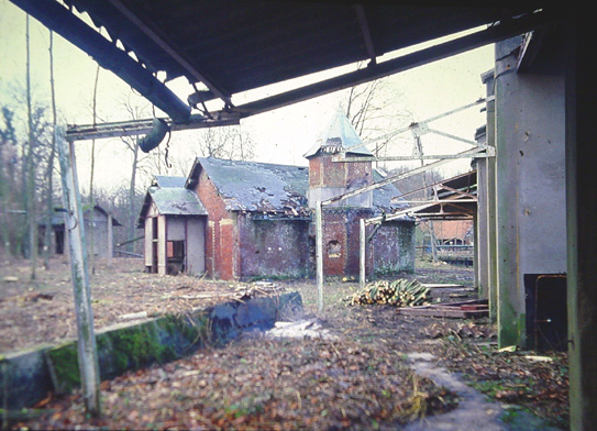 Un des dizaines de bâtiments de la poudrerie d'Esquerdes, abandonné depuis 40 ans environ, photographié entre 1987 et 1990, Pas de Calais, Nord de la France.